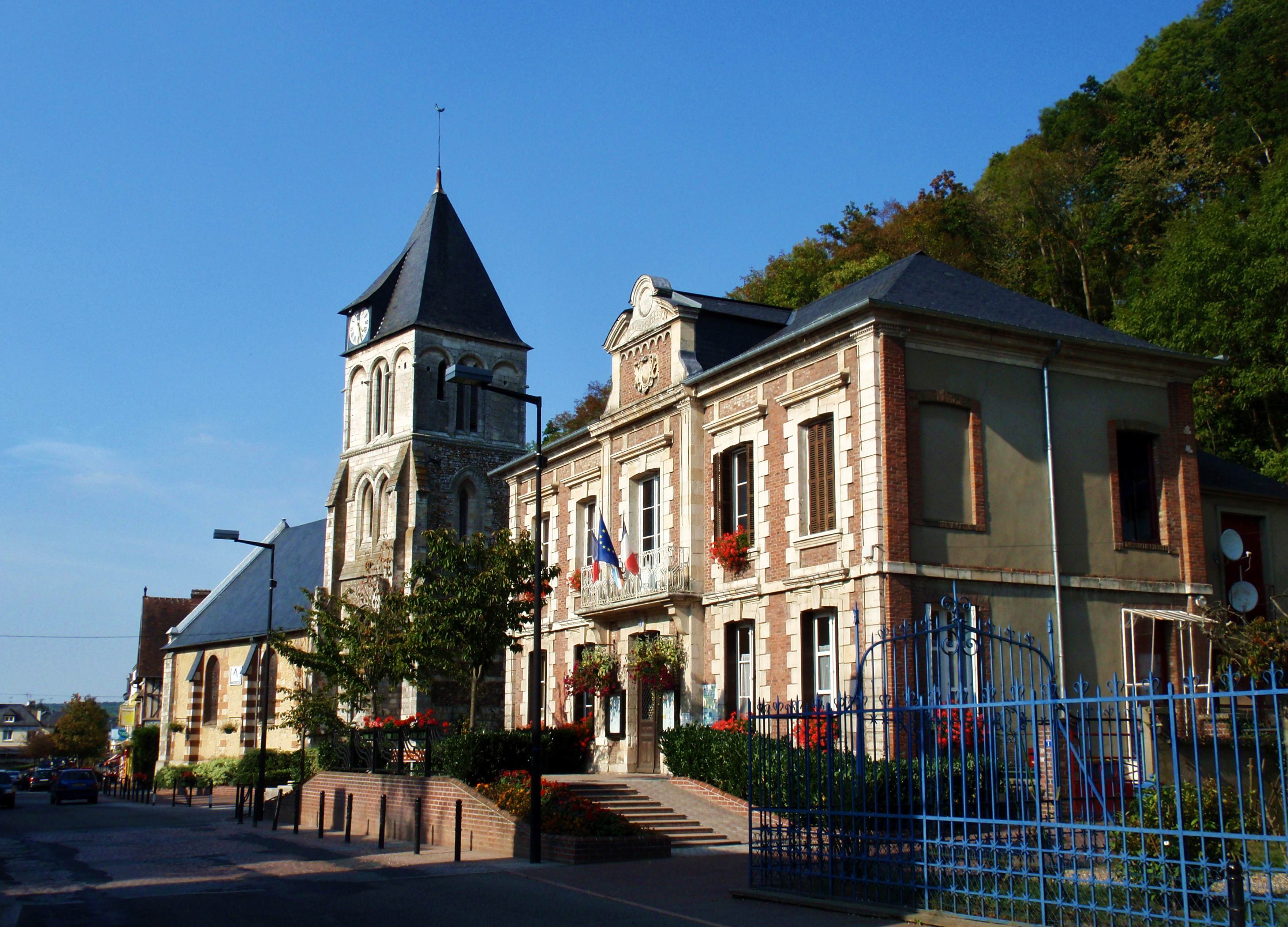 Montfort-sur-Risle (Eure, France). La mairie et l'église.